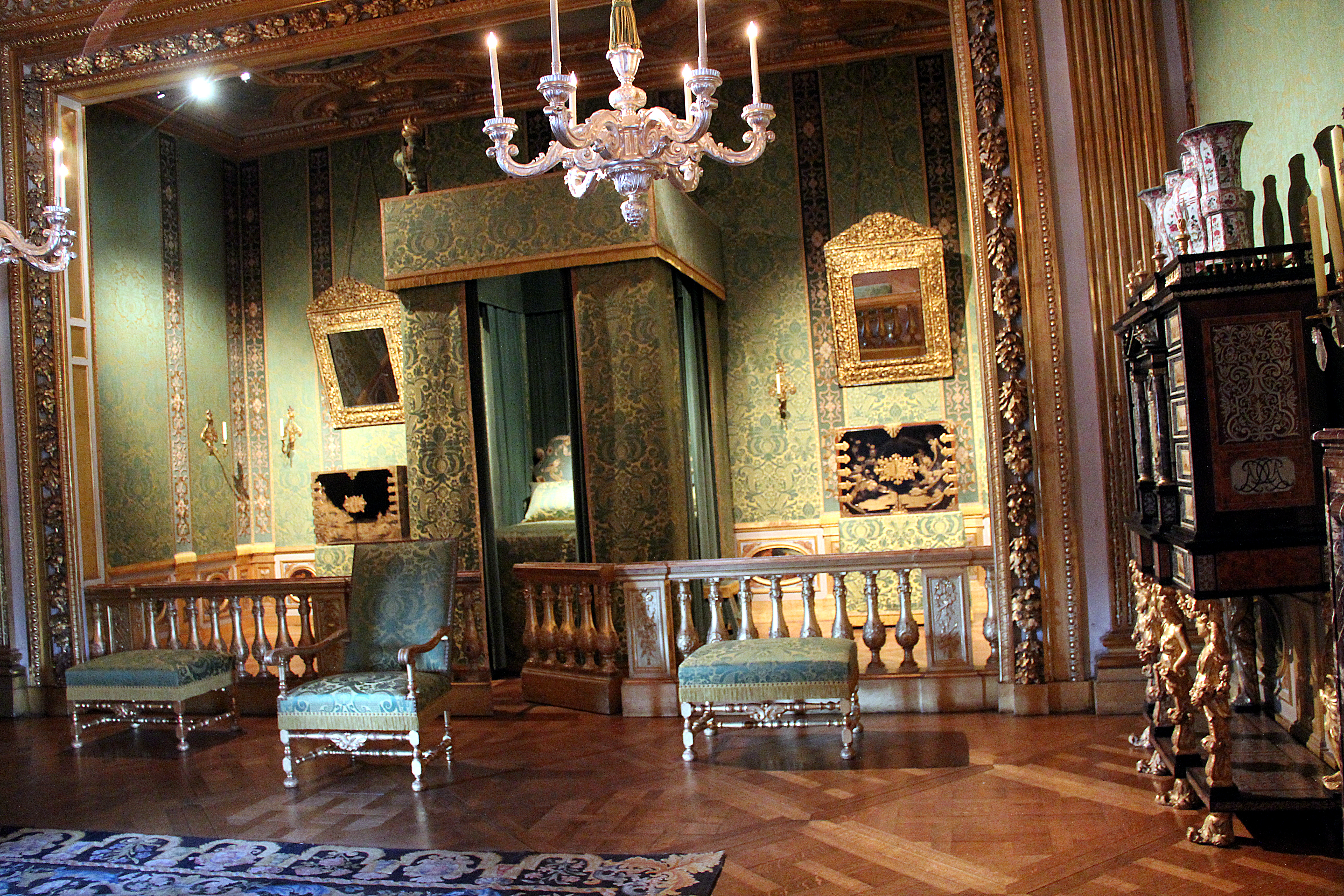 La chambre du Roi - Château de Vaux-le-Vicomte - Maincy (Seine-et-Marne, France).